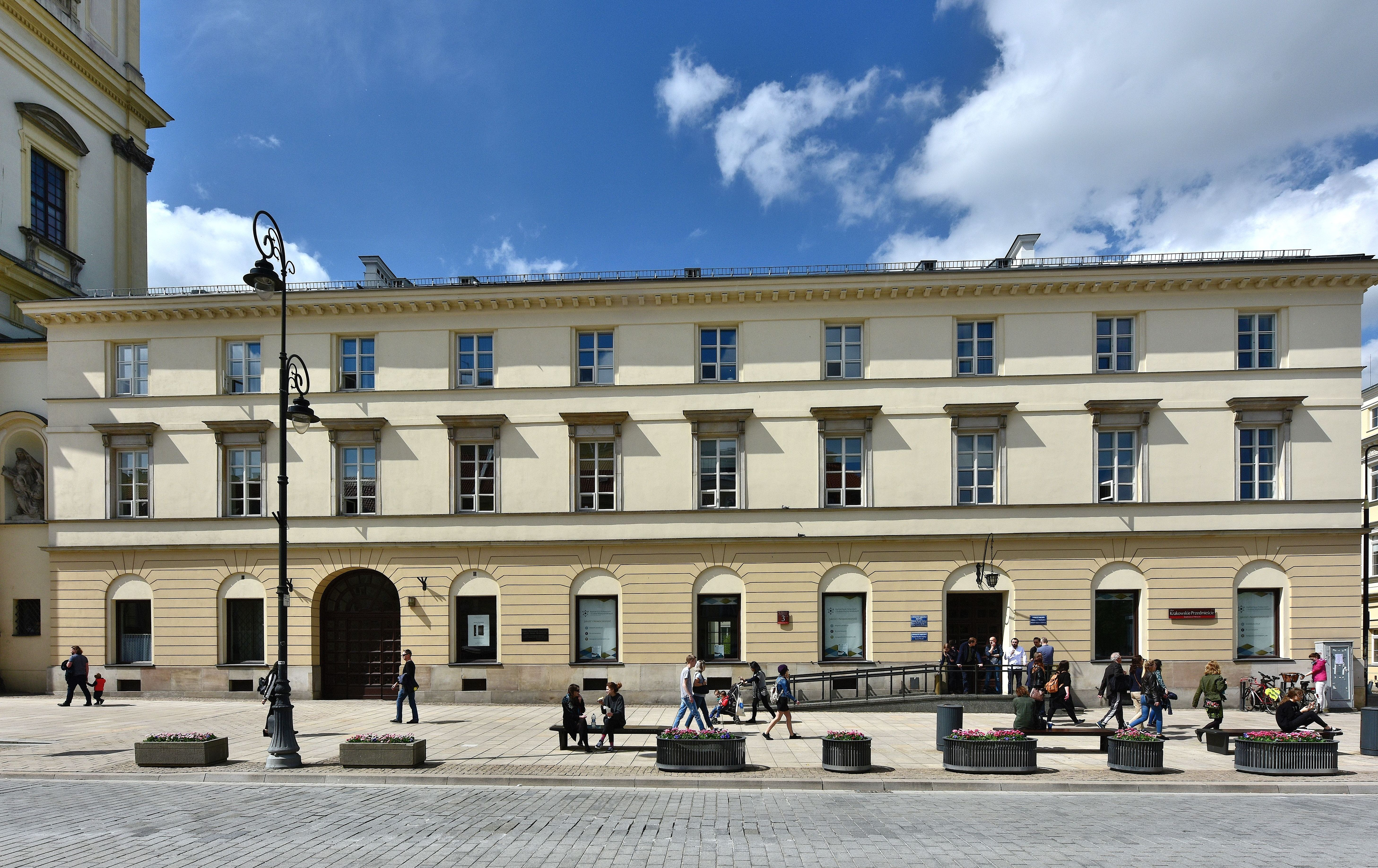 Budynek dawnego III Gimnazjum Męskiego przy ul. Krakowskie Przedmieście 3 w Warszawie, obecnie Uniwersytet Warszawski